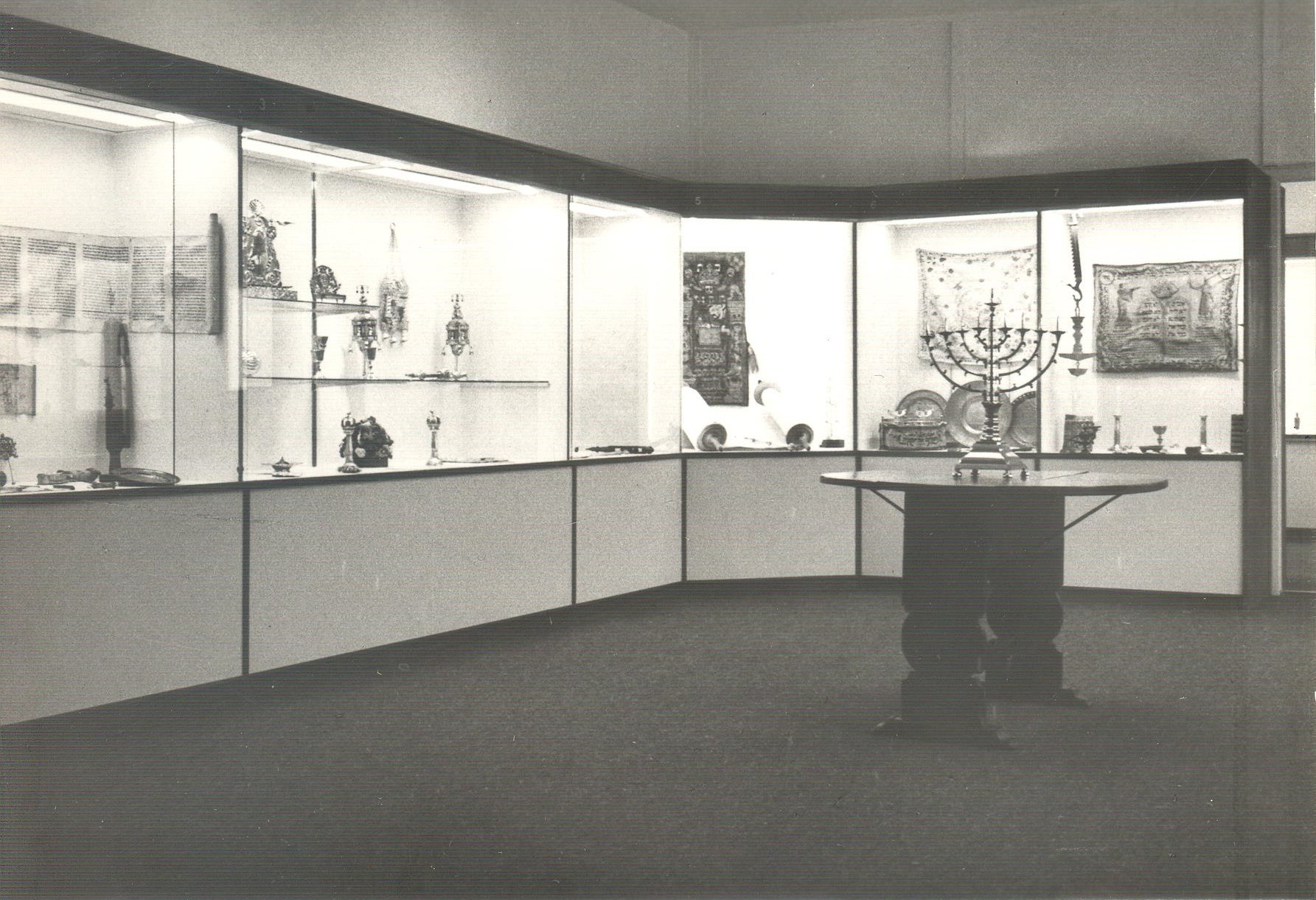 Raumansicht der Daueraustellung in 1966, Jüdisches Museum der Schweiz